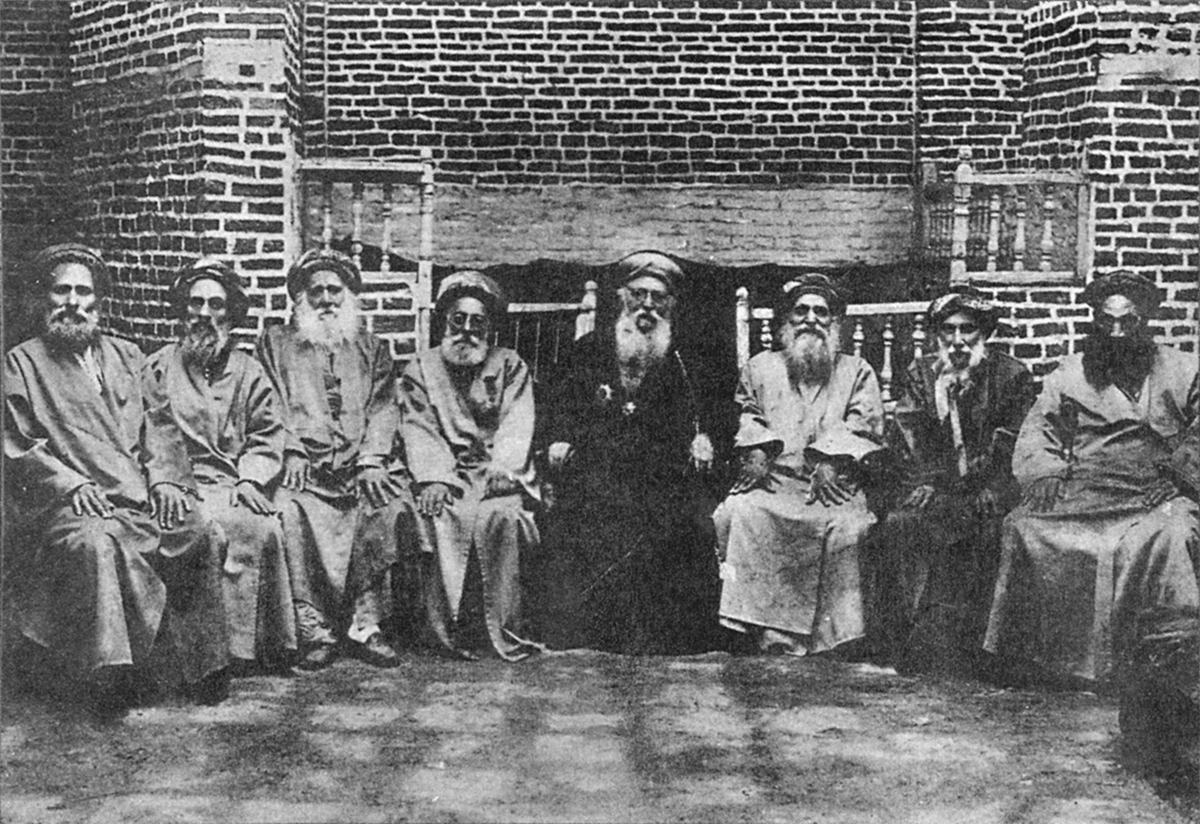 רבני עיראק בין השנים 1903 - 1911. מימין לשמאל: יחזקאל הלוי, אברהם הלל, יצחק אברהם שלמה, דוד פאפו, ששון לוי, משה שמש, עזרא אדם ועזרא דנגור